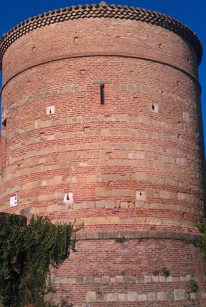 Tour des Rondes, (Inscrit, 1971) .